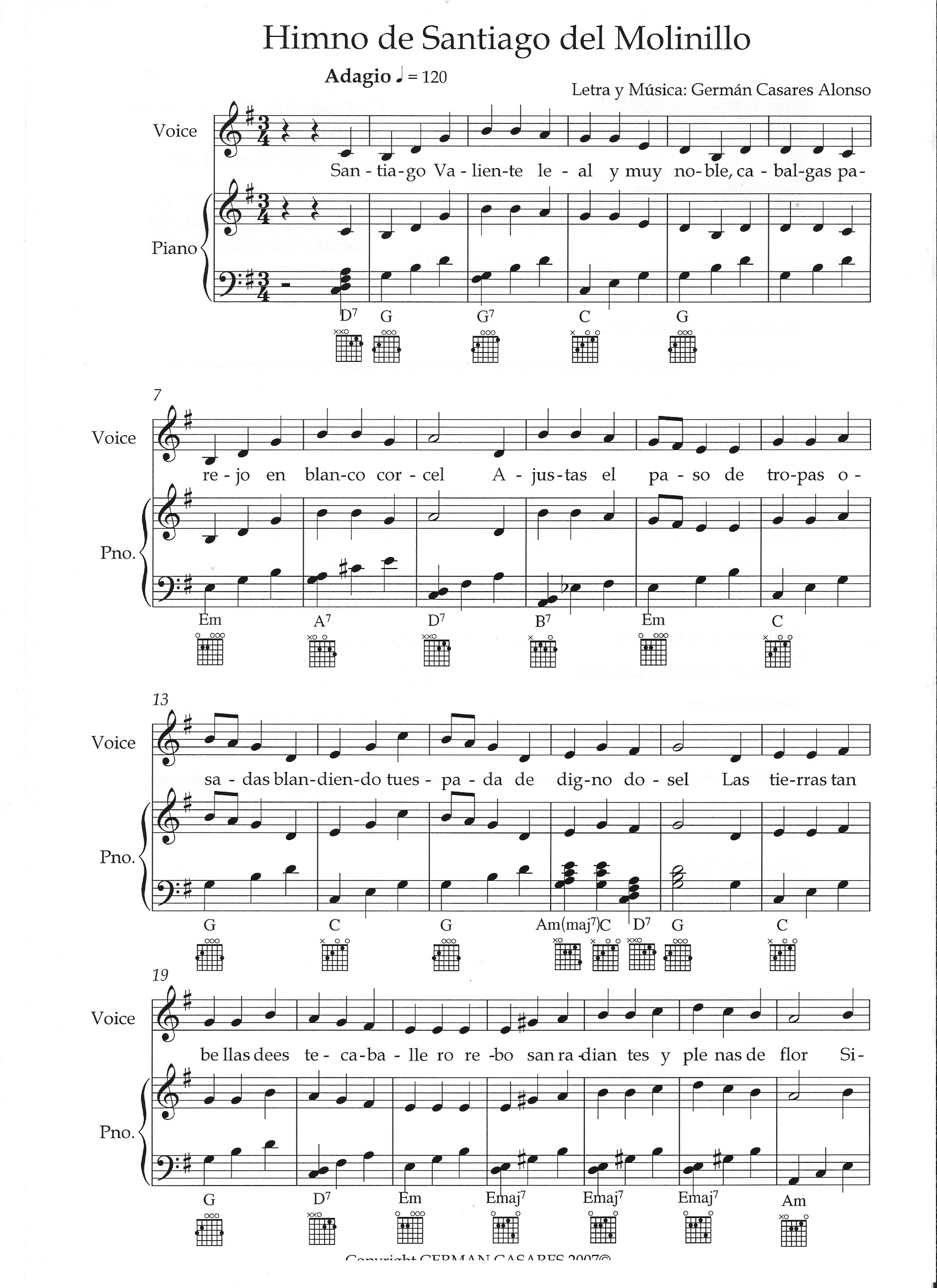 Hoja primera de la partitura elemental del Himno Santiago del Molinillo, en el municipio de Las Omañas (León, España) para voz y piano.